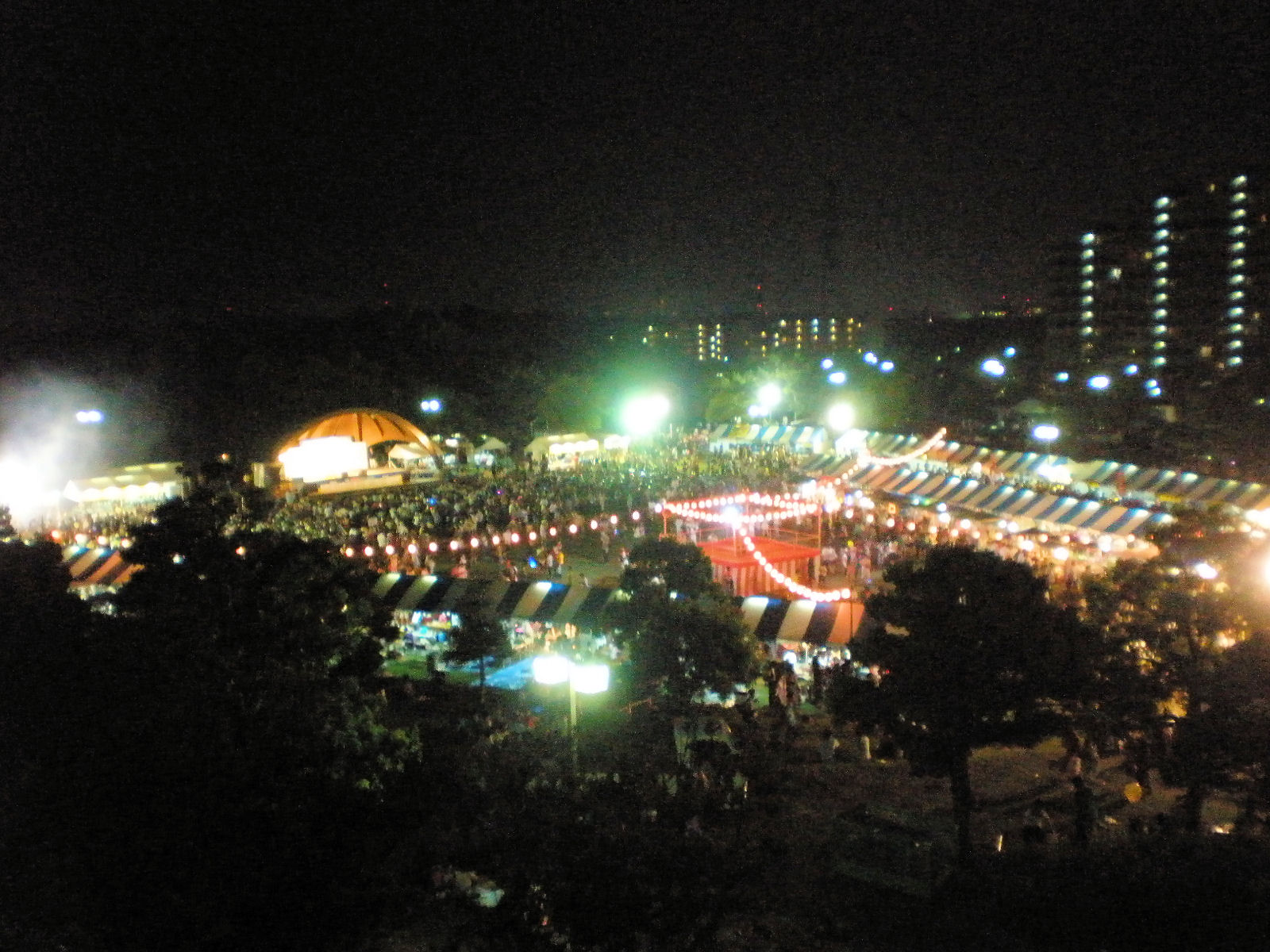 愛知県小牧市の桃花台中央公園で行われる桃花台まつり